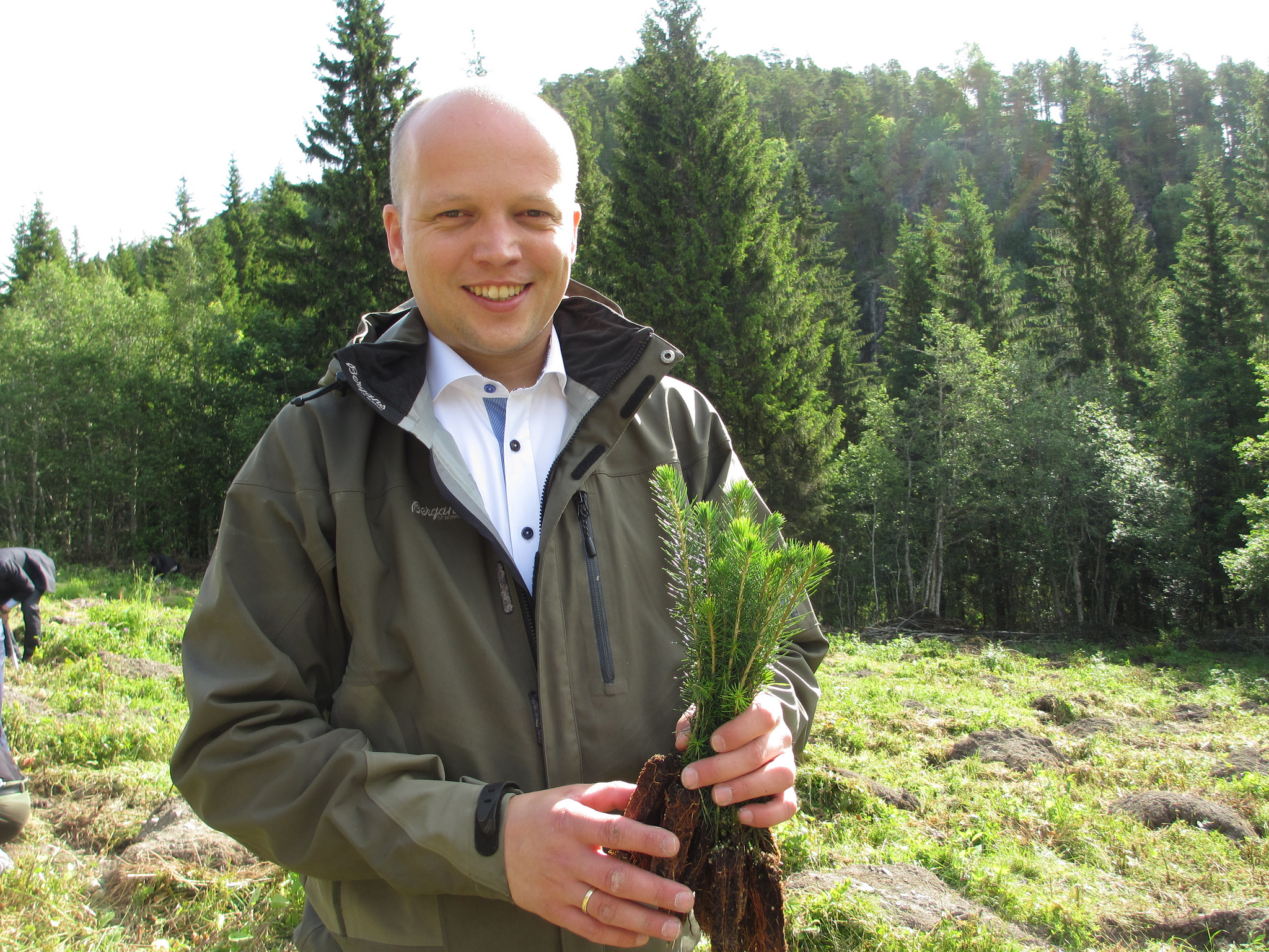 Foto: Landbruks- og matdepartementet